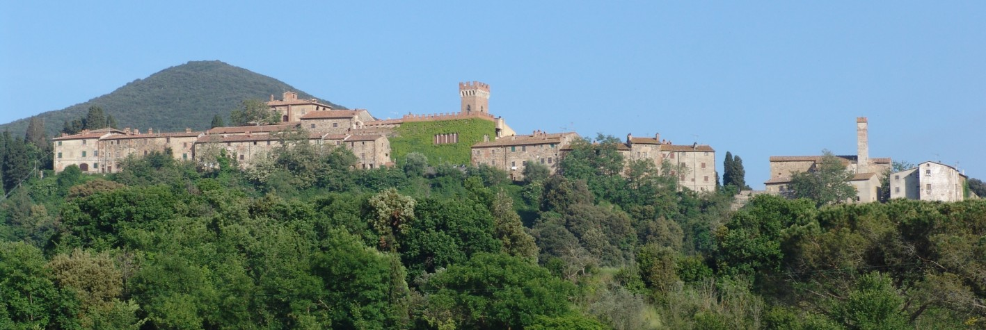 Il borgo ed il castello di Querceto (Montecatini Val di Cecina)